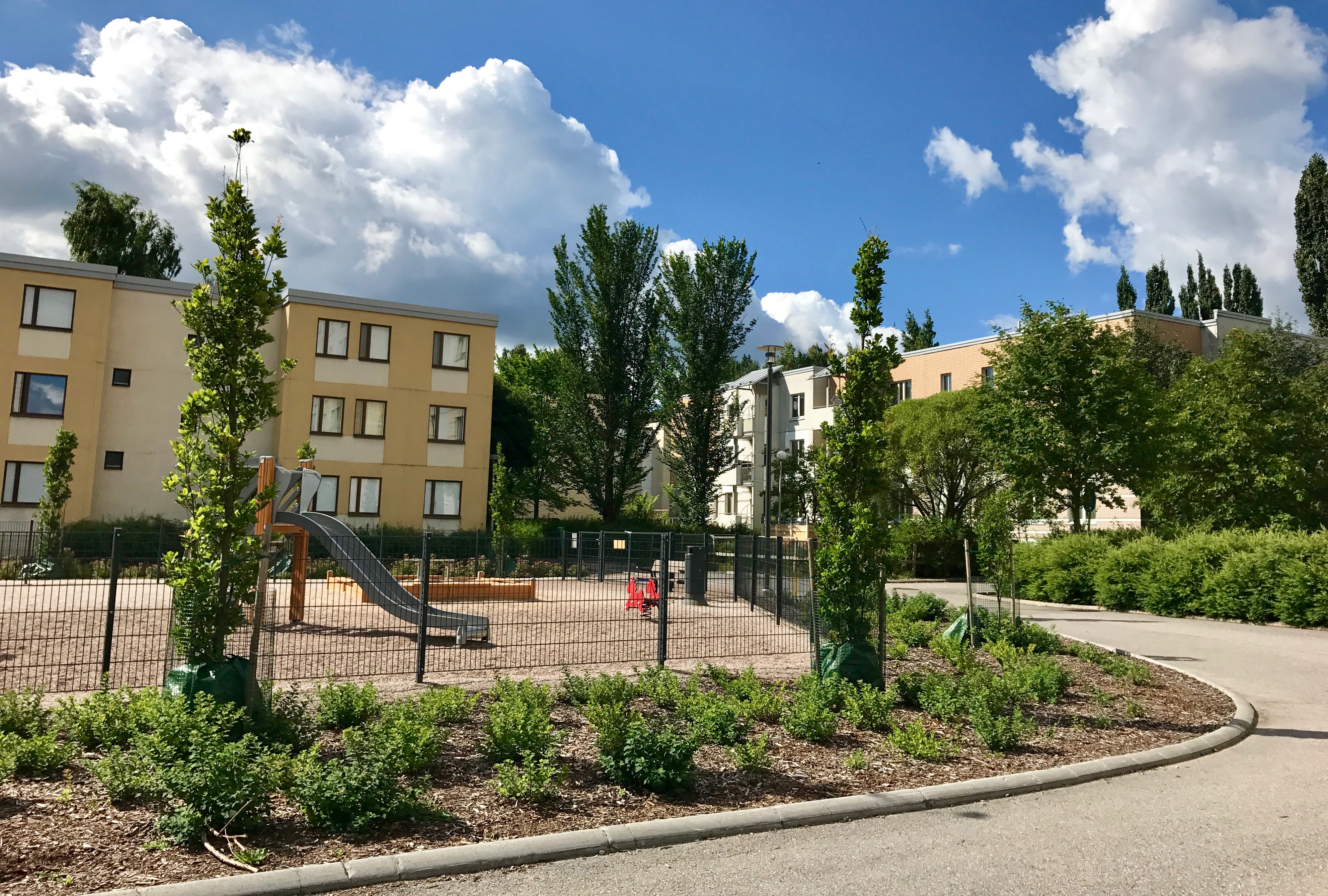 Näkymä Perkkaalta